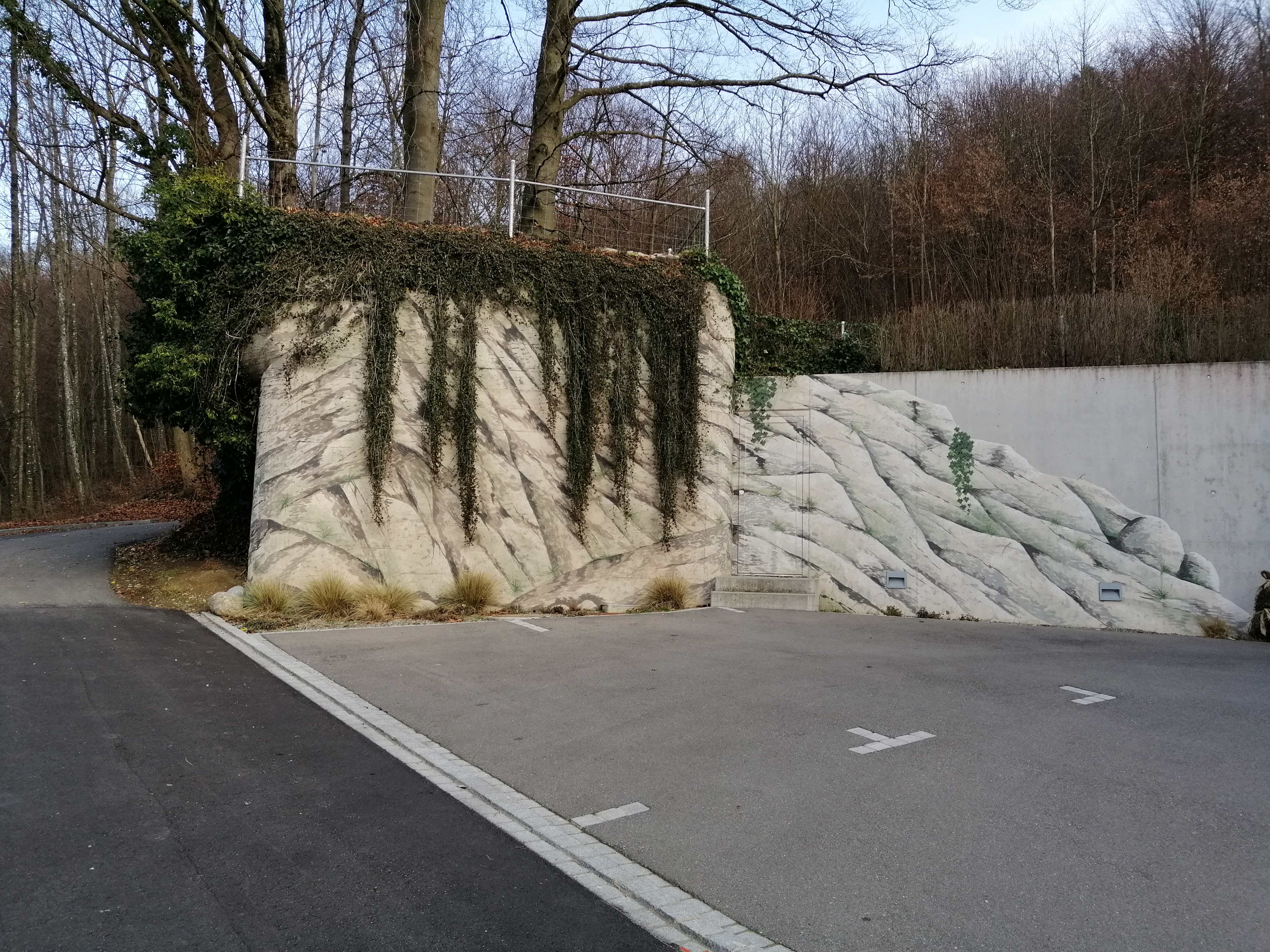 Sperrstelle Gebenstorf AG, Schweiz